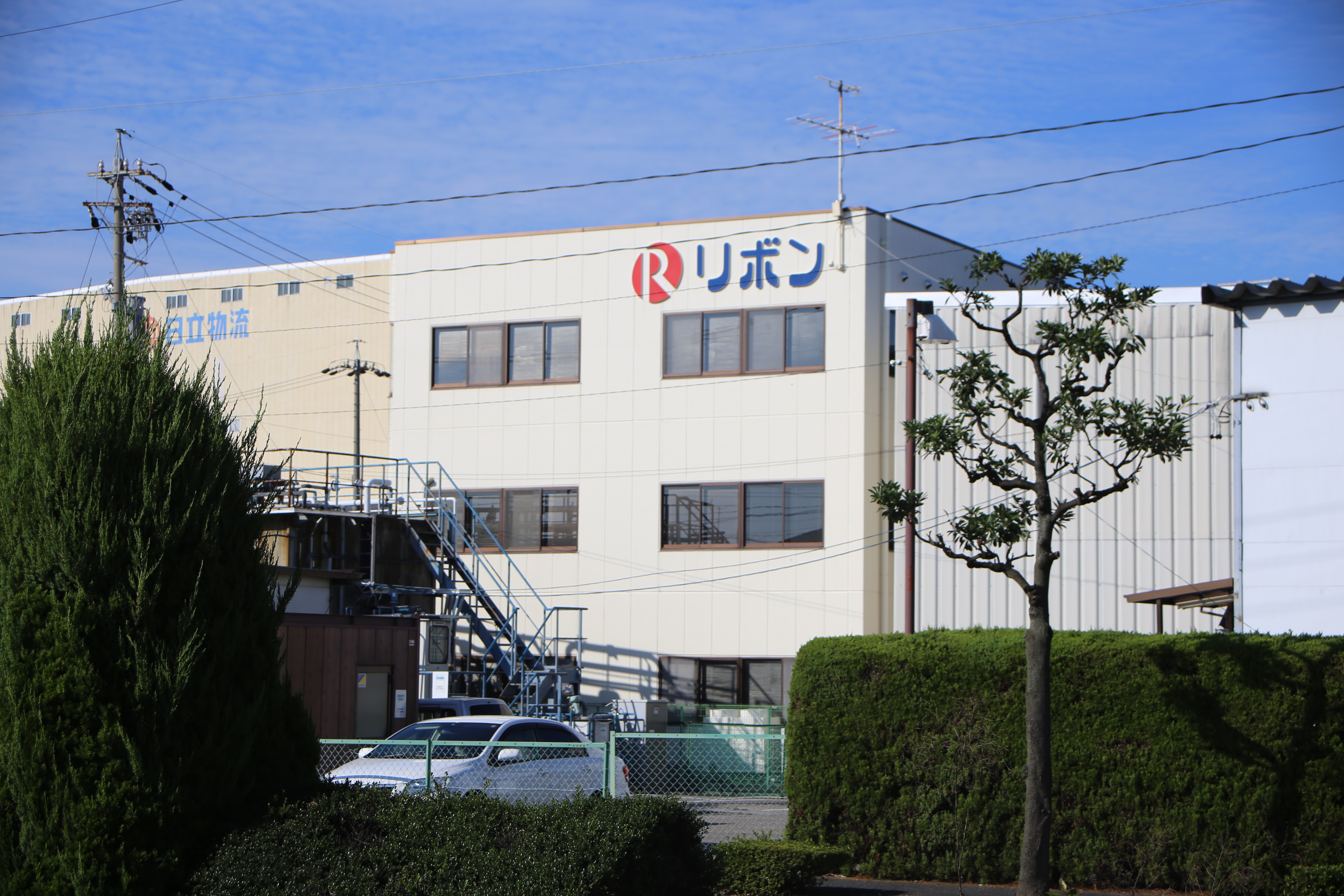 愛知県小牧市のリボン本社